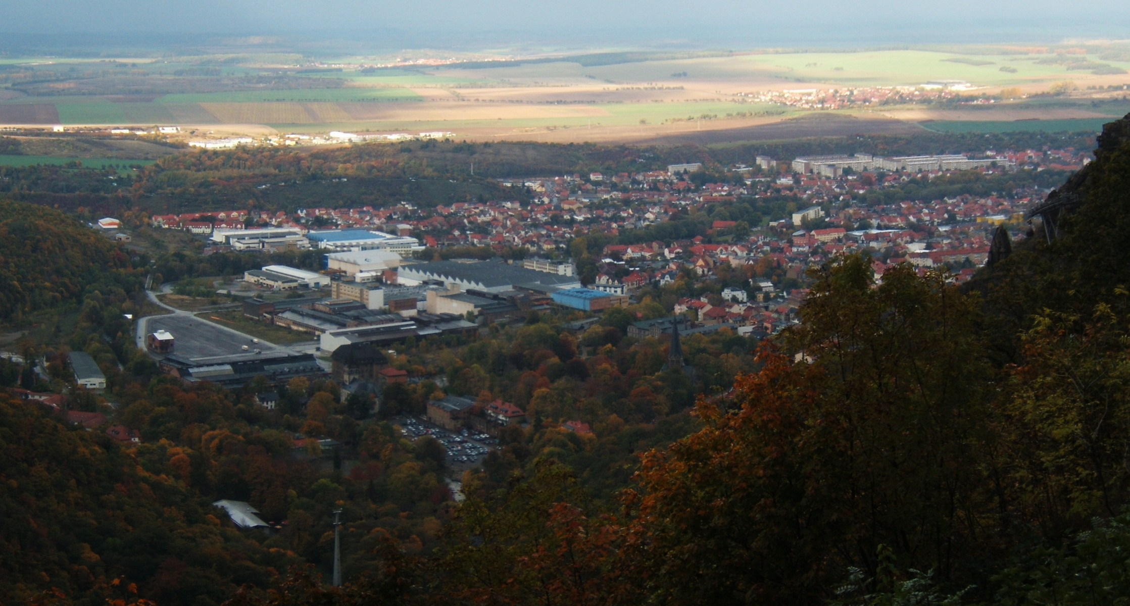 Blick vom Hexentanzplatz auf Thale (leider trübes Wetter, kann gerne durch besseres Foto ersetzt werden)